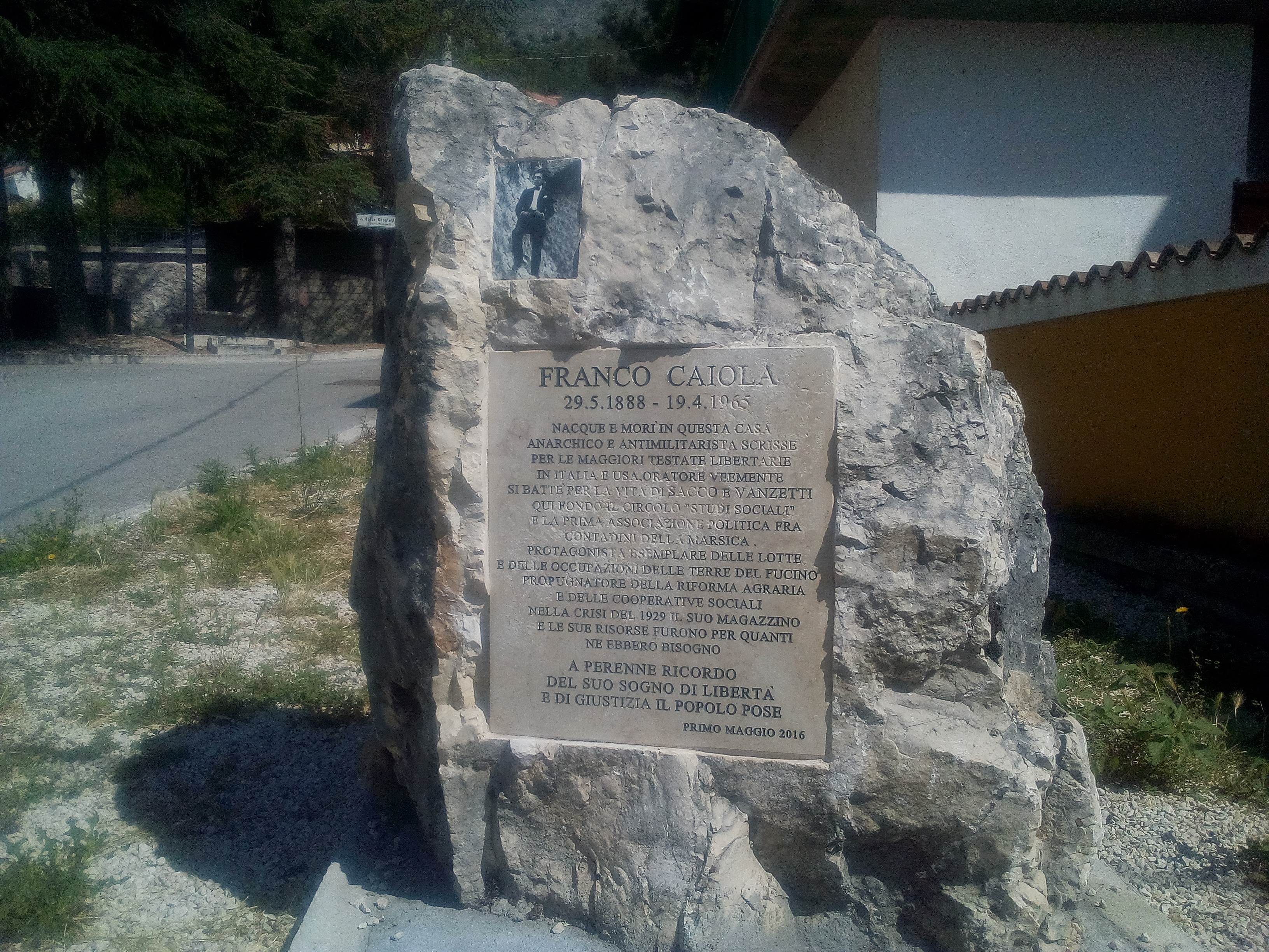 Stele con targa dedicata a Franco Caiola a Paterno di Avezzano